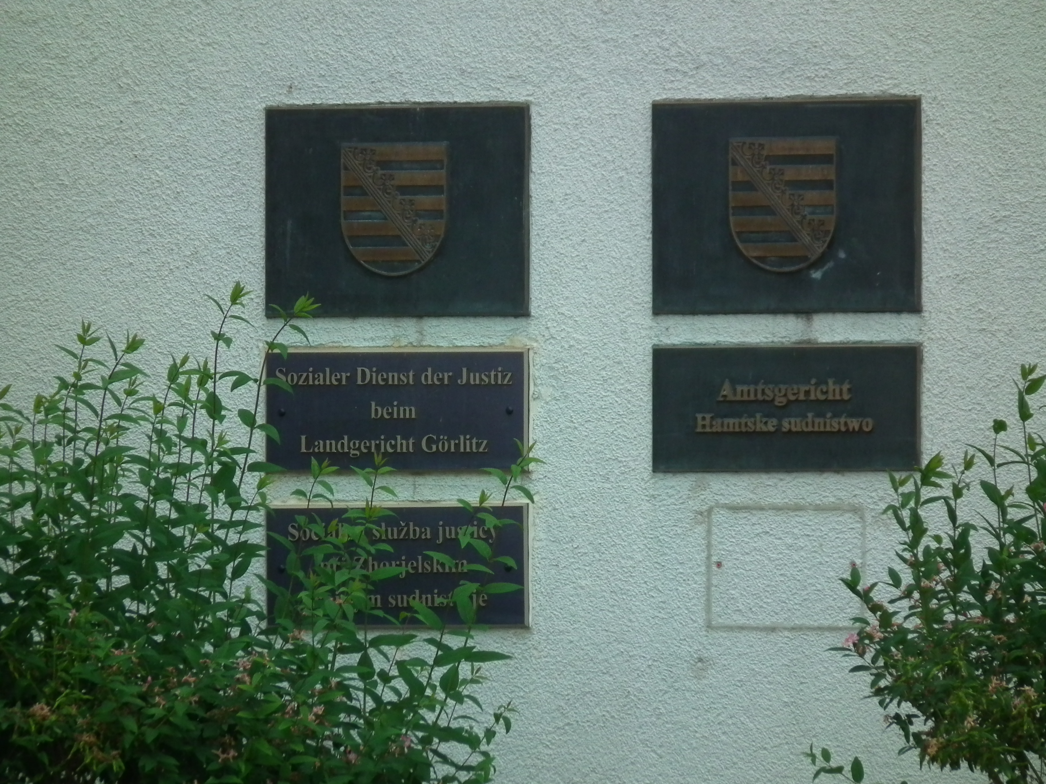 Zweisprachige Schilder am Amtsgericht in Hoyerswerda Hornjoserbsce: Dwurěčnej tafli při hamtskim sudnistwje we Wojerecach.